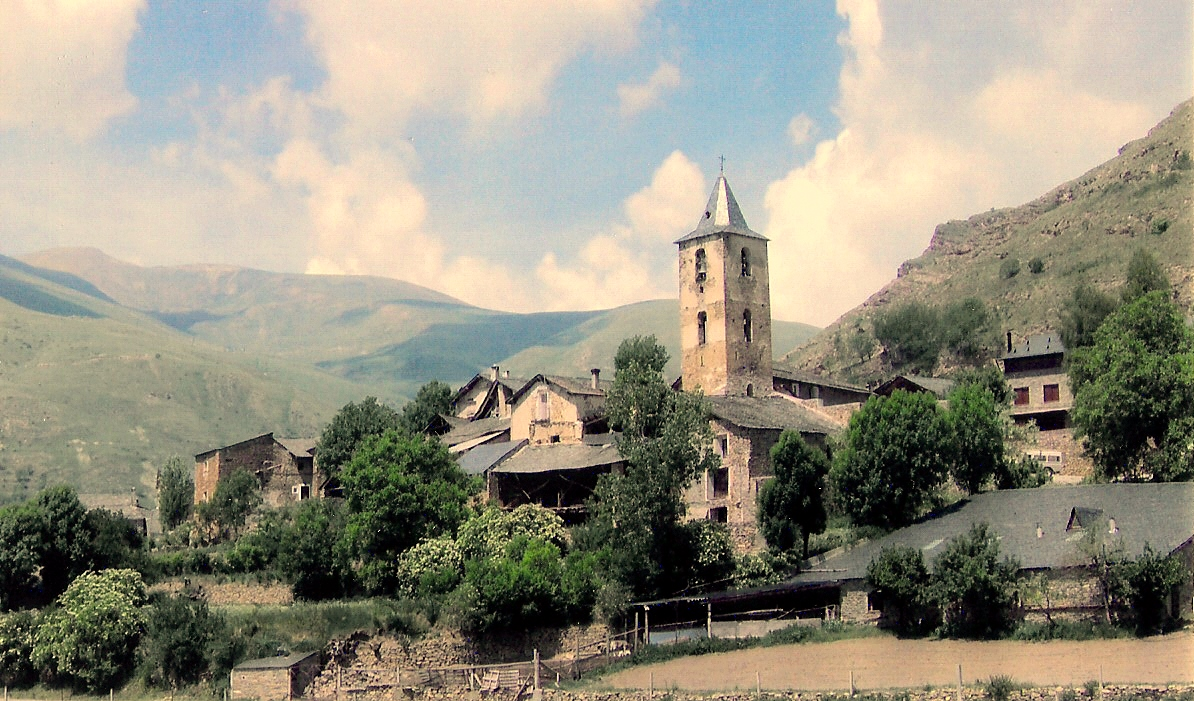 LLESSUI - Municipi del Pallars Sobirà incorporat a Sort ja el 1970. Ocupa la capçalera de la vall d´Àssua, coincident amb la del riu Pamano ( o de Bernui), que, amb la riera de Sall, forma el riu de Sant Antoni. El poble és un coster, al vessant dels contraforts del massís del Montsent, dominant la vall del riu del Pamano. L´església parroquial es dedicada a Sant Pere. Fou la població més important de la vall d´Àssua. El municipi també comprèn el poble i antic mo0nestir de Saurí i els deswpoblats de la Torre, Menauri i Torena.